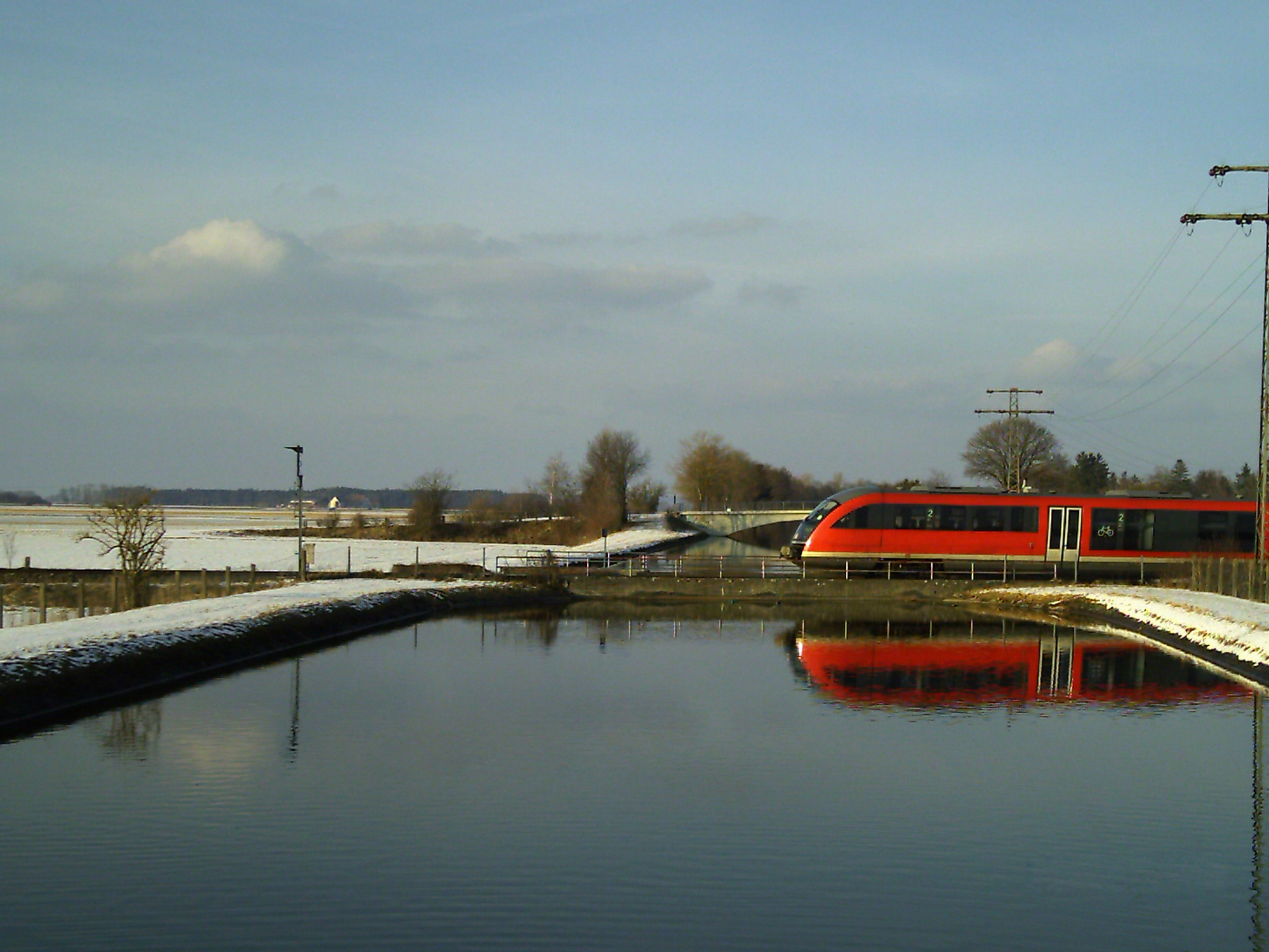 Illerkanal beim Illerkraftwerk II.